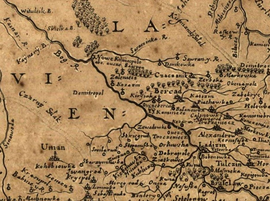 Казавчин (Kozazin) на карті Боплана 1648 р.